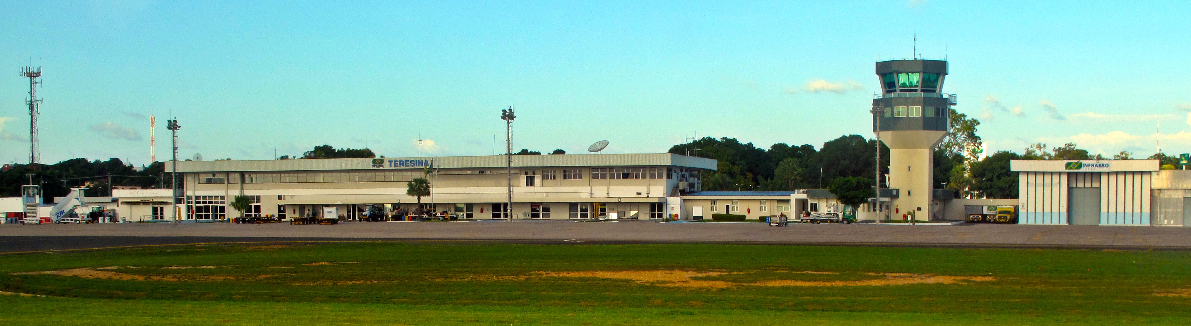 Aeroporto de Teresina, Piauí, Brasil Teresina Airport in Teresina, Piauí, Brazil